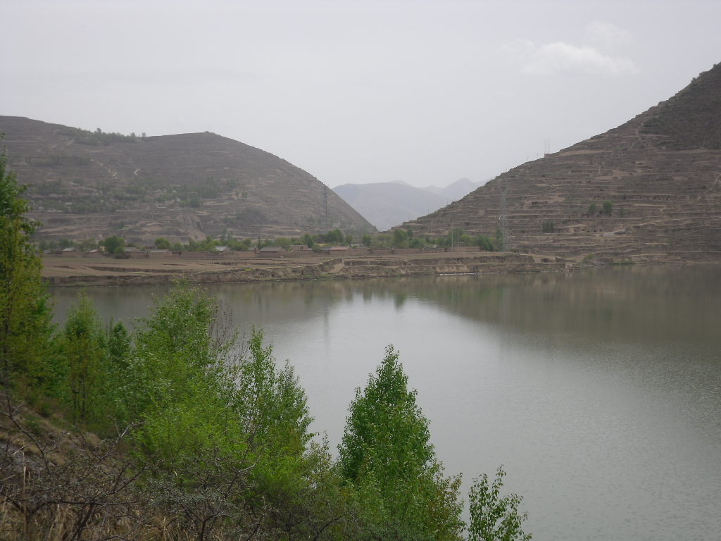 岷县洮河